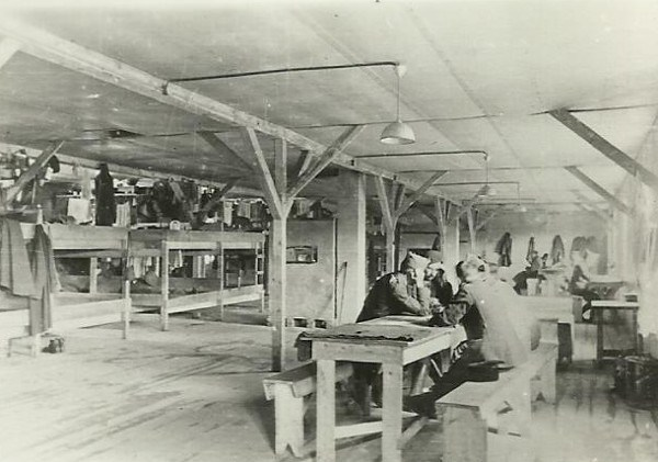 Baraquement du Stalag-IA situé à Stablack